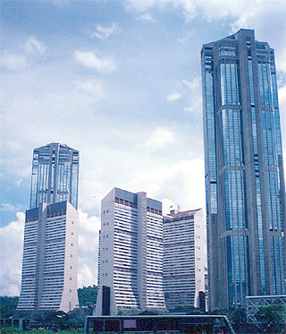 Torres de Parque Central, las terceras mas altas de Latinoamerica en Caracas, Venezuela, hacen denominar a Caracas la Sucursal del Cielo